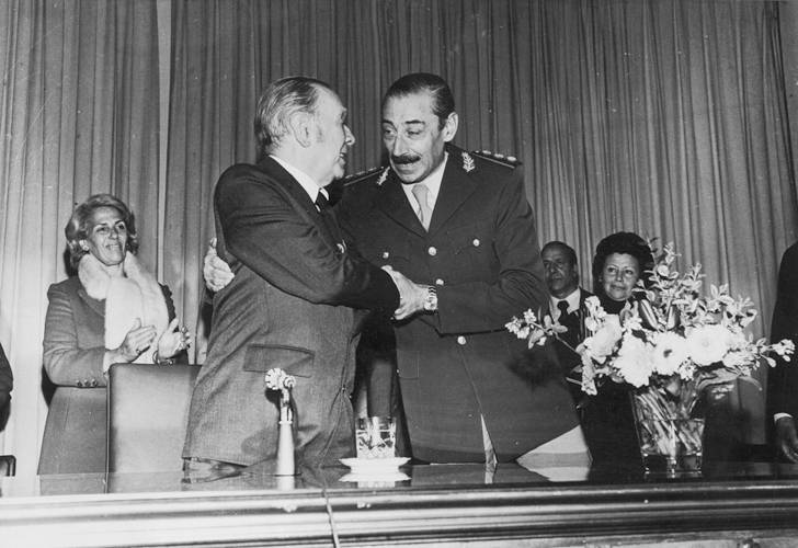 El Dictador de Argentina Jorge Rafael Videla saluda en una conferencia al escritor Jorge Luis Borges.